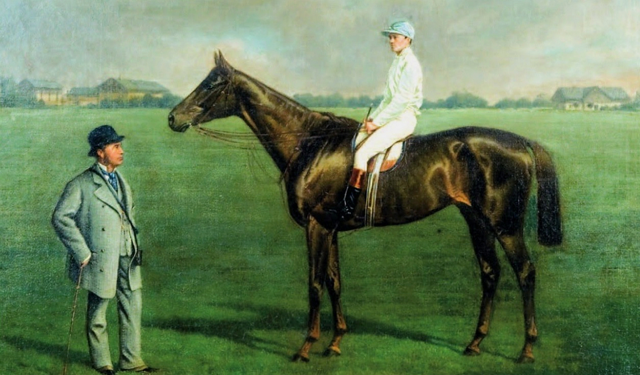 Schnaebeli, Heinrich, Berliner Fotograph und Historienmaler des 19./20.Jh. "Kincsem", Sieger im Zukunfts-Preis von Baden 1876 und Grosser Preis von Baden in den Jahren 1877, 1878 und 1879, sign., Ortsbez. Berlin, Öl/Lw., 55 x 73 cm, minim. besch., Provenienz Internationaler Club Baden-Baden e.V.